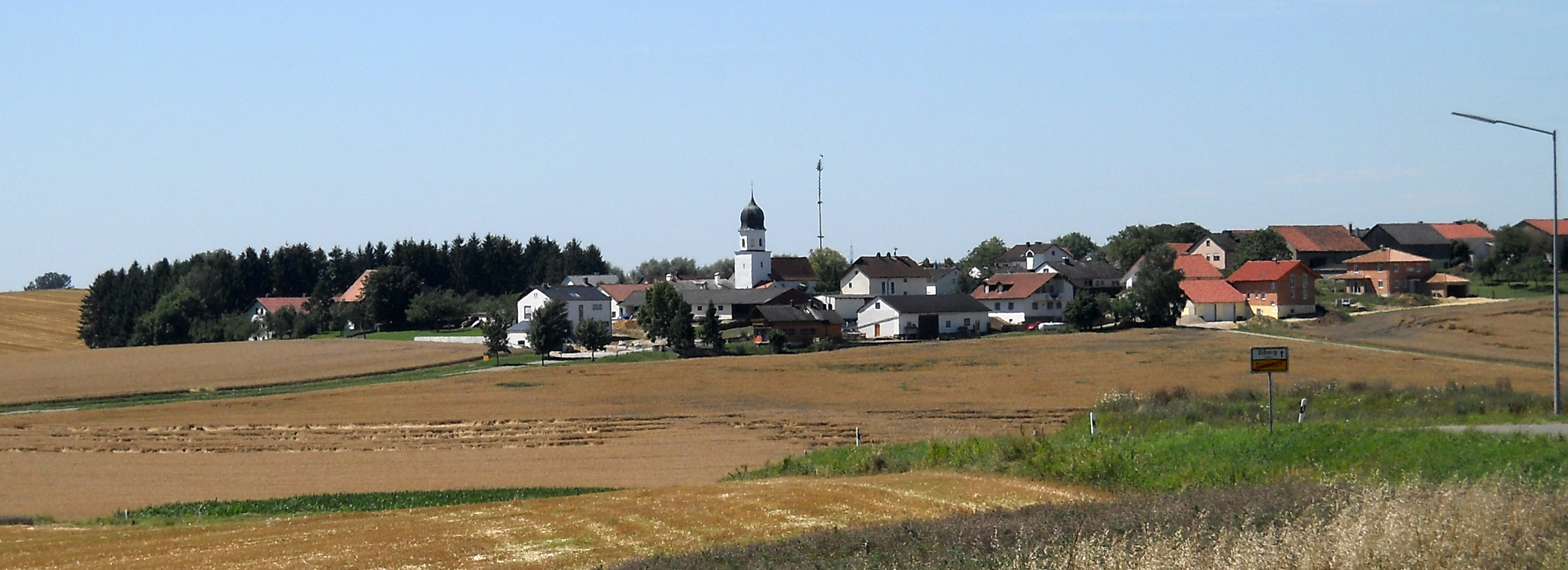 Biberg bei Kipfenberg, Ortsansicht von NO.